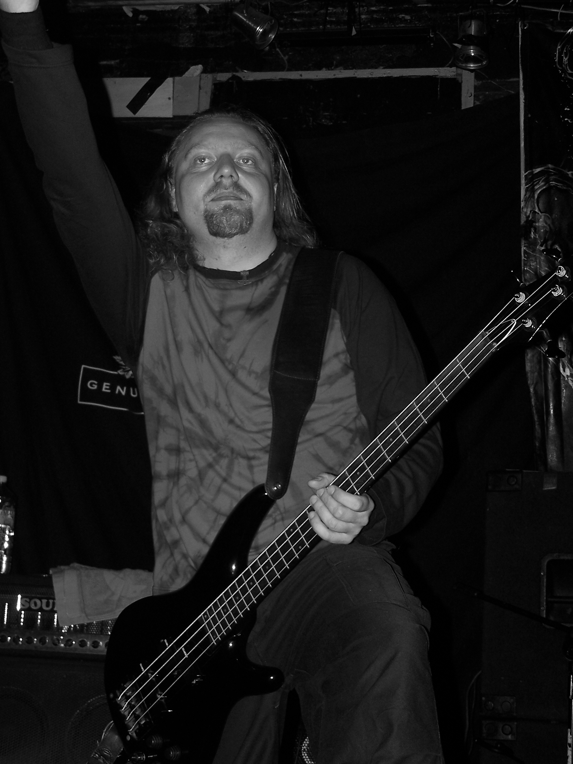 Remo - basista zespołu Artrosis podczas koncertu w katowickim Mega Clubie.